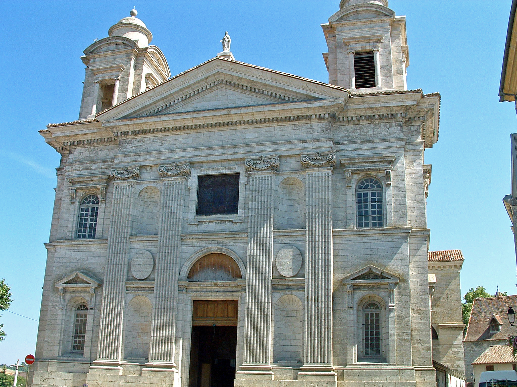 Nérac - Eglise Saint-Nicolas - Façade occidentale